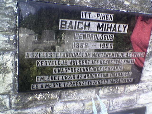 Baich Mihály sírja közelről a szelestei temetőben